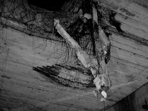 Bombeneinschlagsloch im U-Bootbunkers Valentin in Bremen